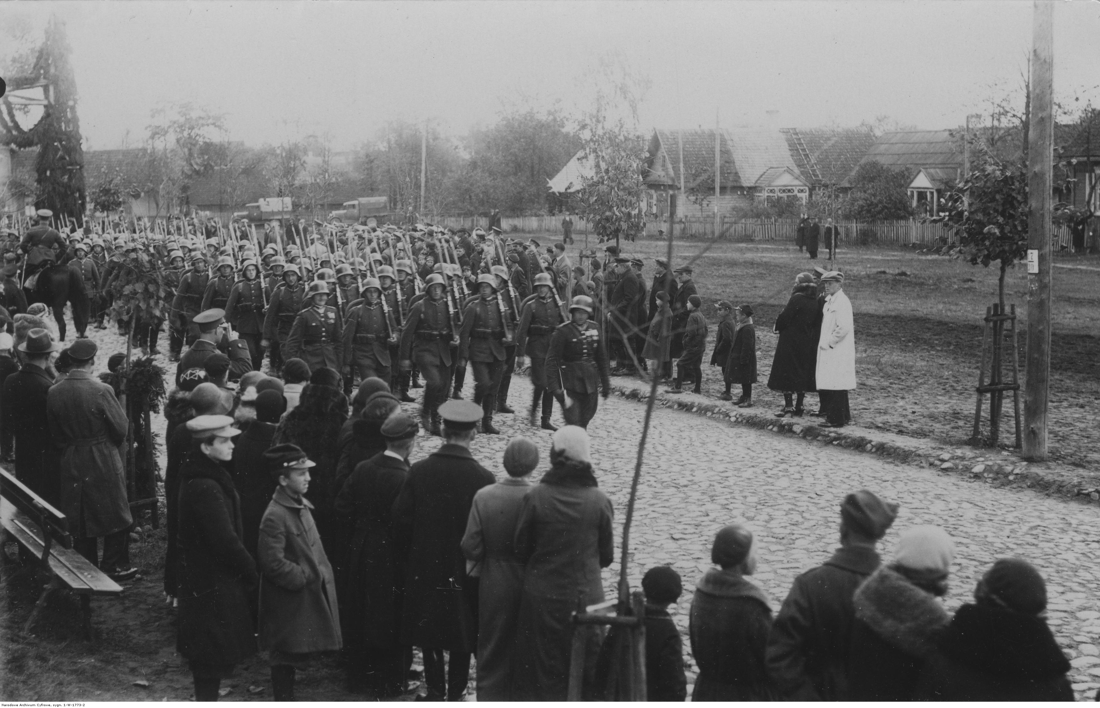 Obchody X- lecia Korpusu Ochrony Pogranicza w Batalionie KOP "Nowe Święciany" w Nowych Święcianach; defilada Batalionu; 1934 r. Koncern Ilustrowany Kurier Codzienny - Archiwum Ilustracji.